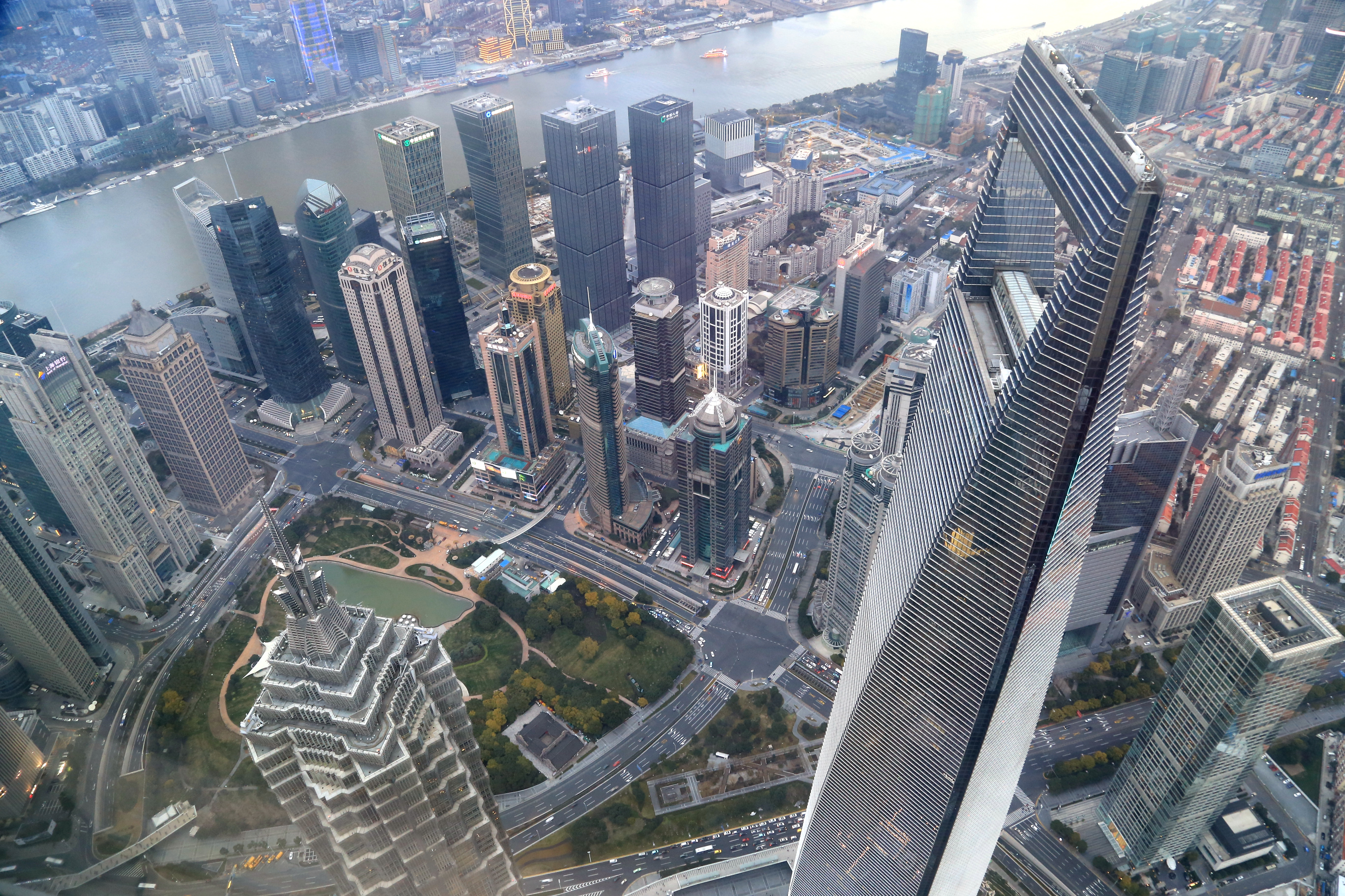 从上海中心大厦观景台俯视SWFC和JMT